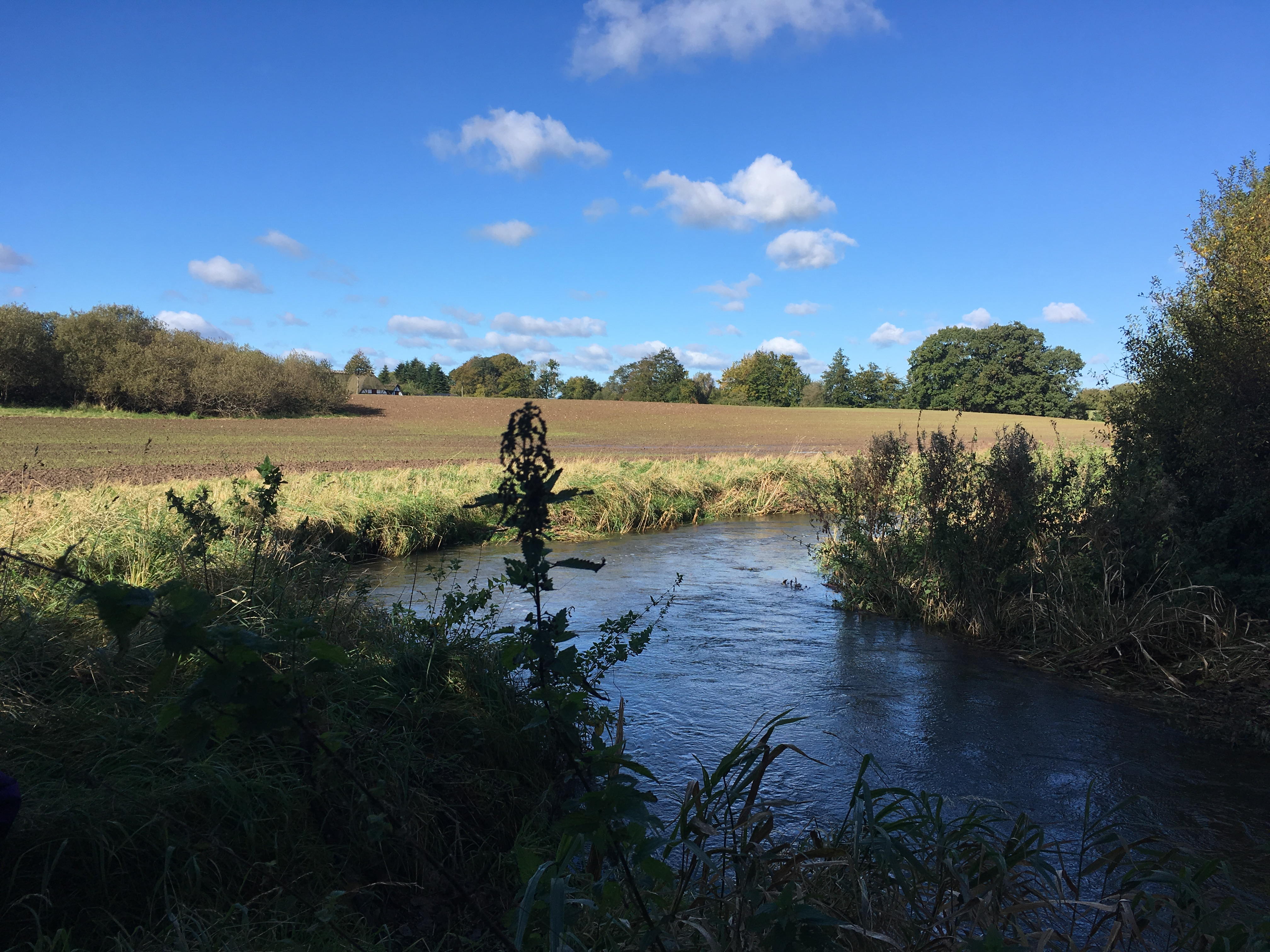 Sundsgårdsvej